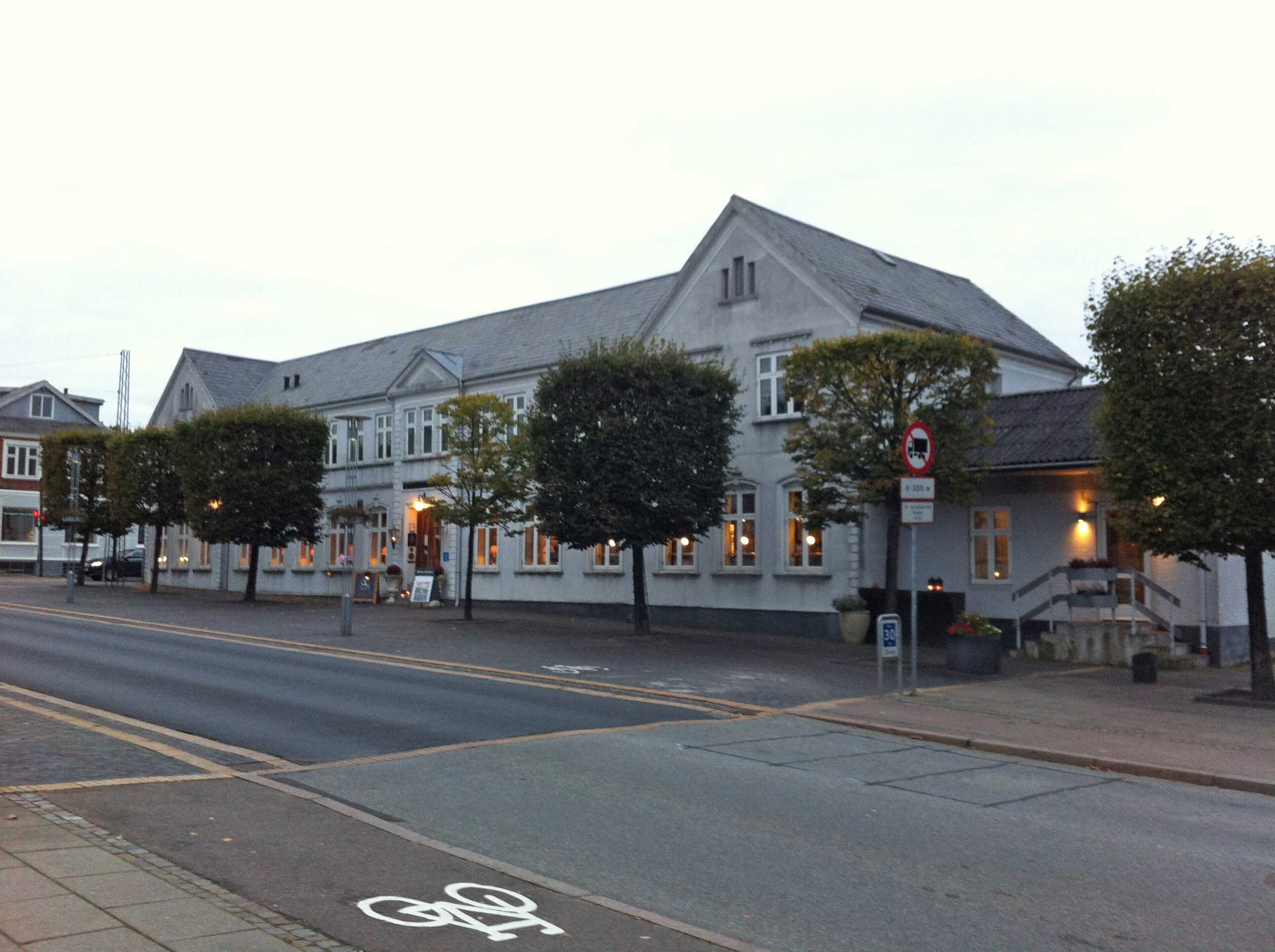 Westergaards Hotel i Videbæk, set fra gaden